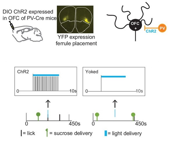 眼窩前頭皮質のPV陽性神経細胞を抑制した実験の図